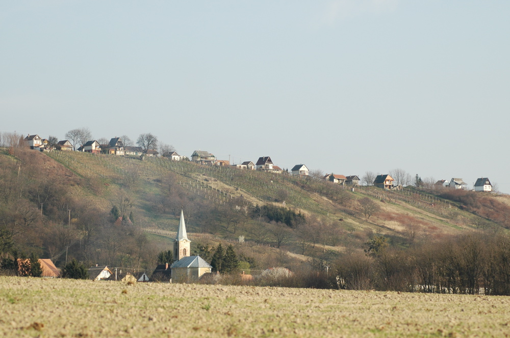 Vineyard in Pusztaszentlászló (Zala county, Hungary)